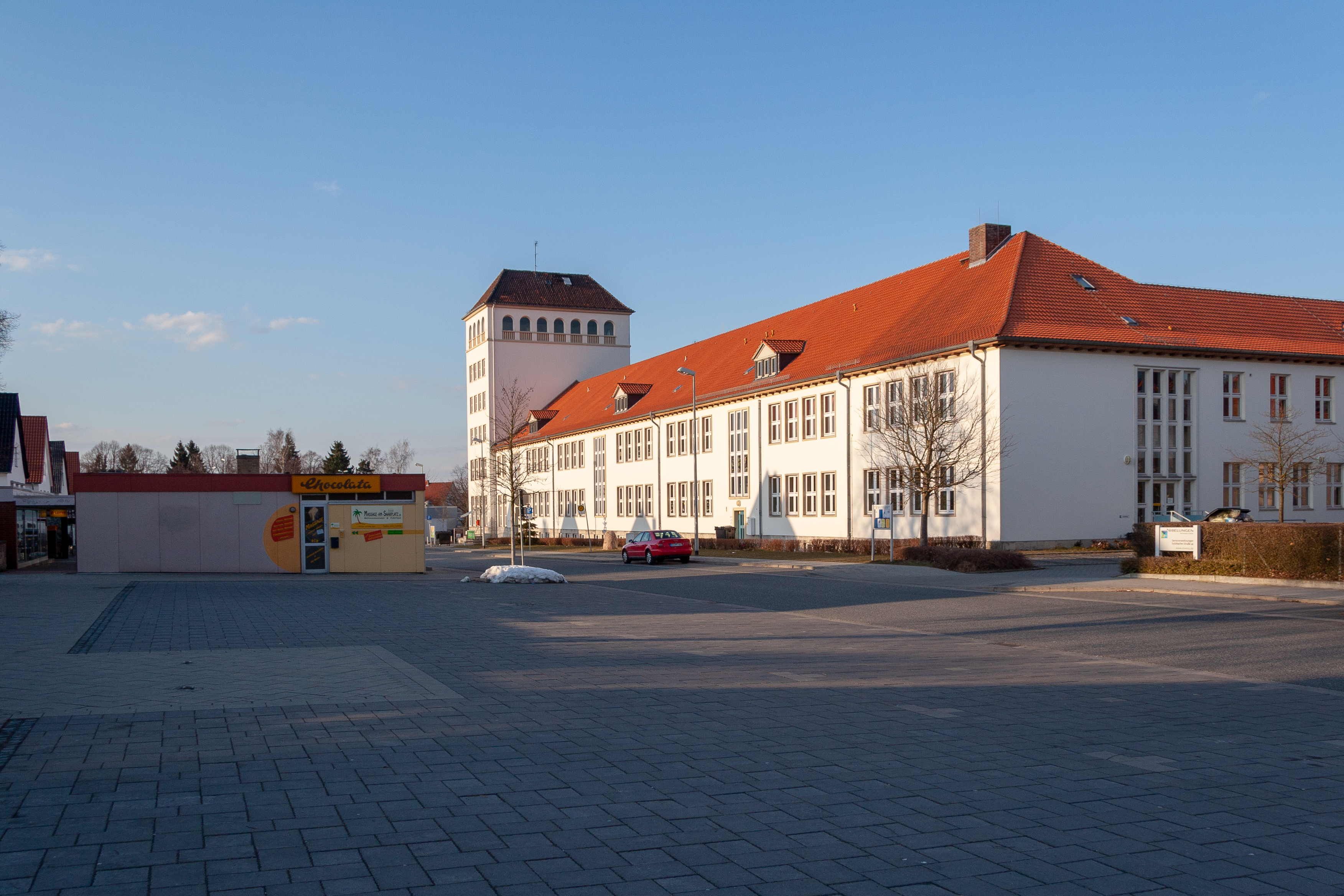 Saarplatz mit Aufbauhaus in Lehndorf, Braunschweig 2013